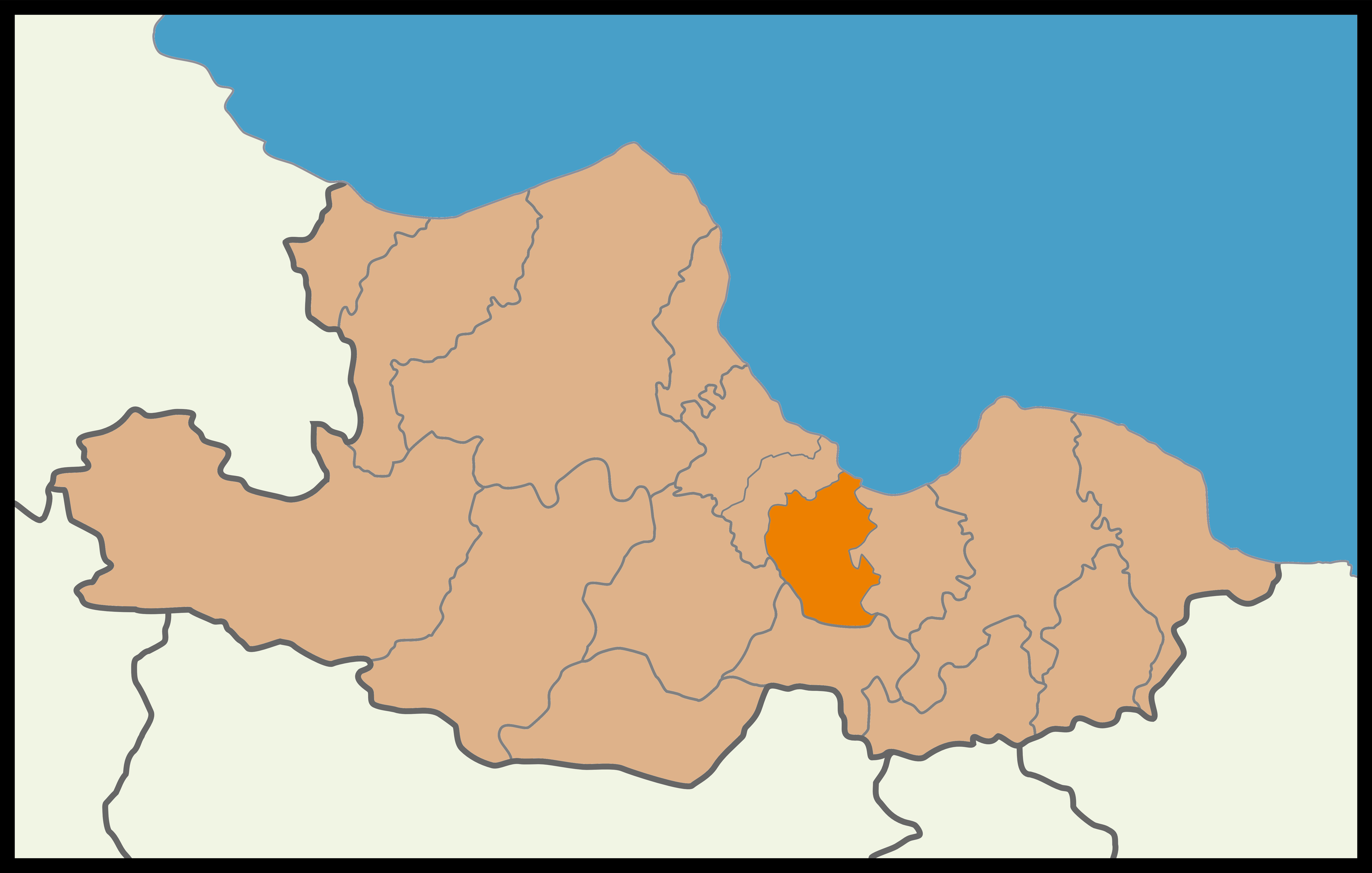 Samsun'un Canik ilçesinin 2015 Türkiye genel seçimleri haritası.